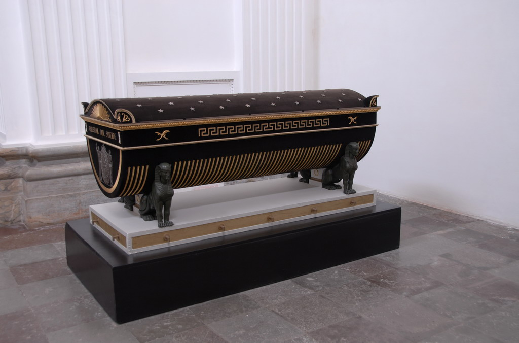 Christiaan VII (1749-1808) werd in 1766 koning van Denemarken en Noorwegen. Christian VII (1749-1808) became king of Denmark and Norway in 1766.